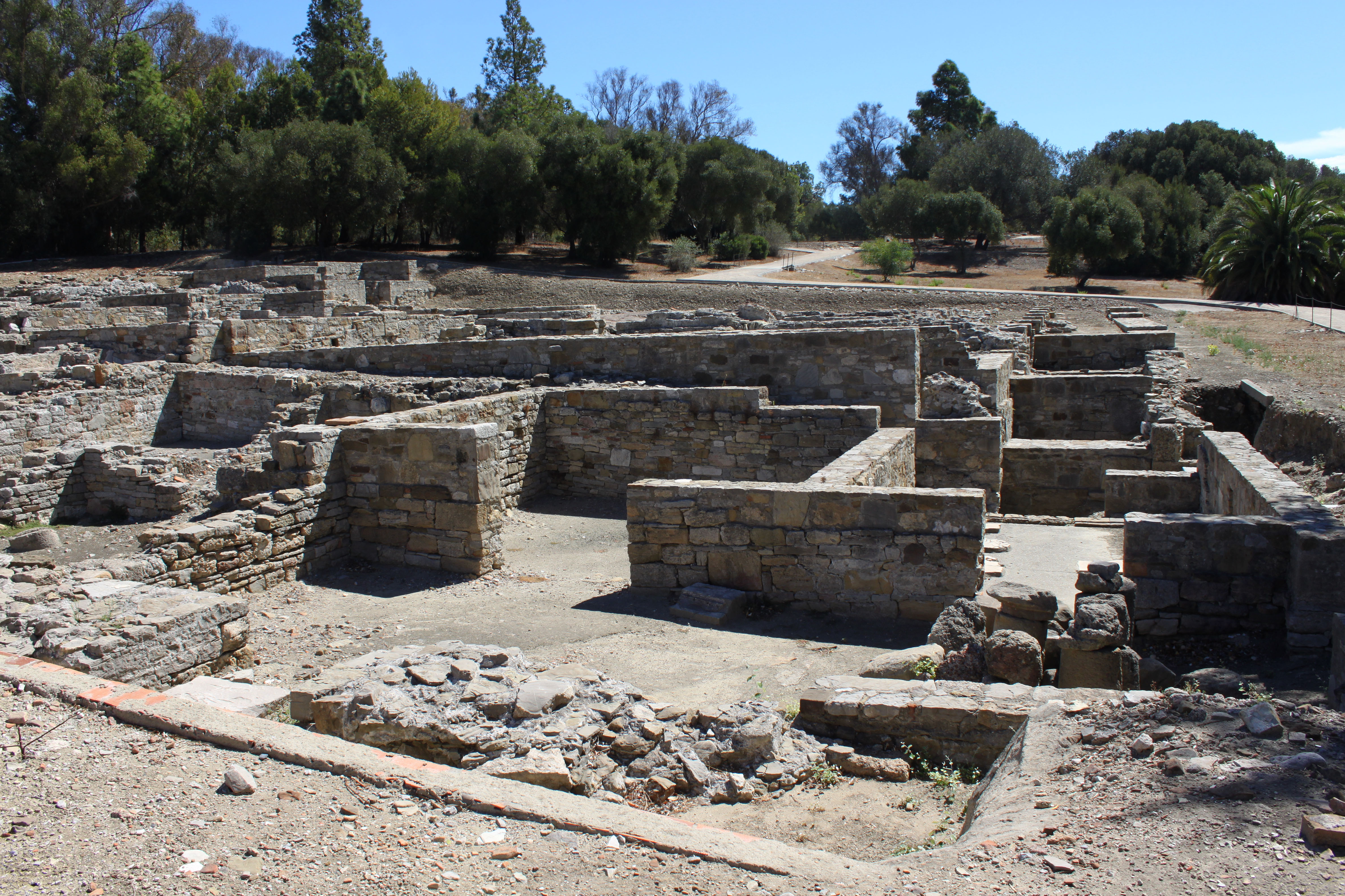 Estructuras visibles de las Termas del yacimiento romano de Carteia. San Roque, Andalucía, España.